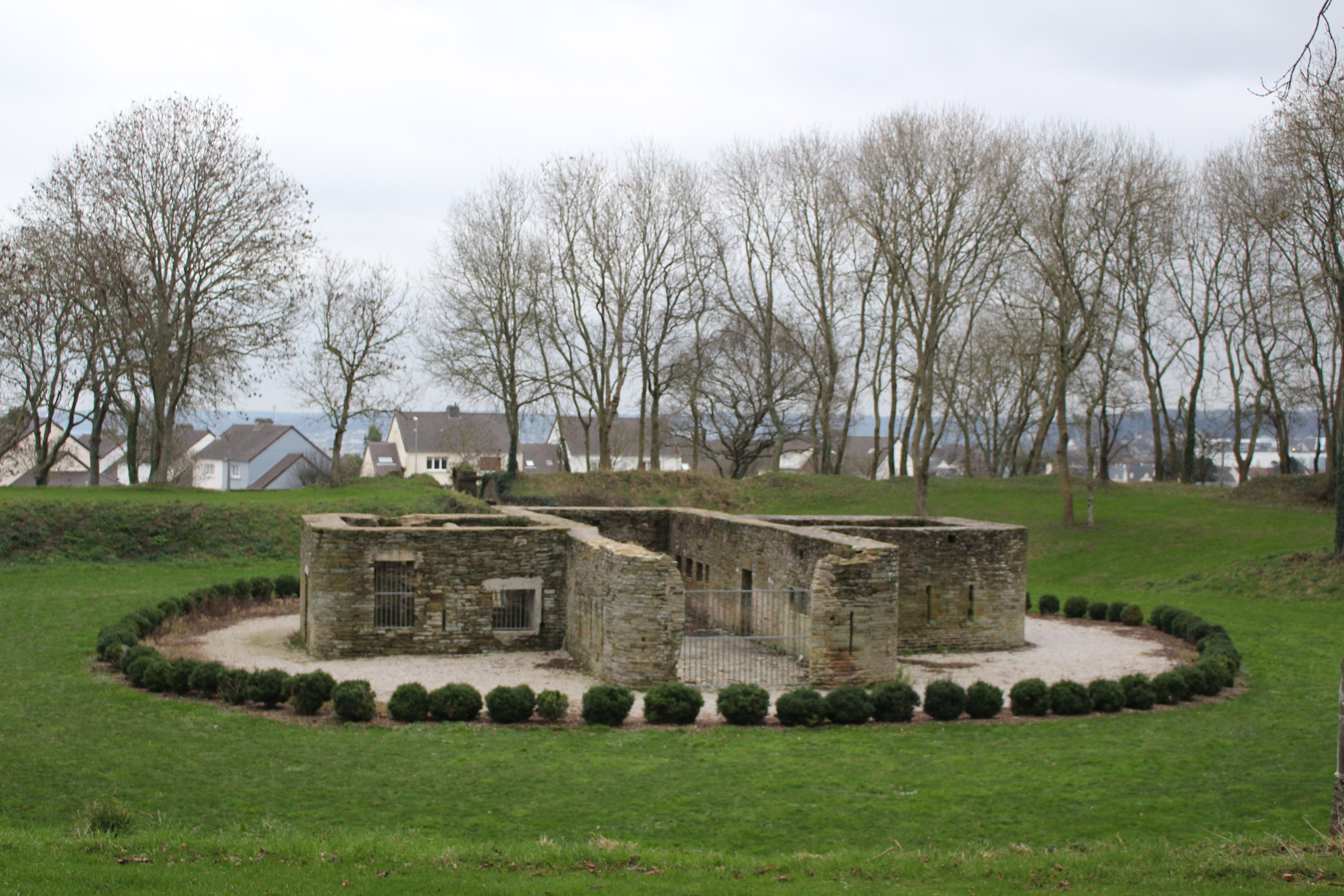 fort du Tôt, Cherbourg-en-Cotentin, Manche